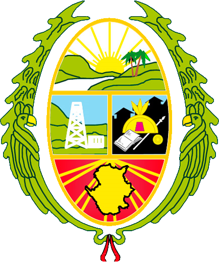 La Convención, Cusco